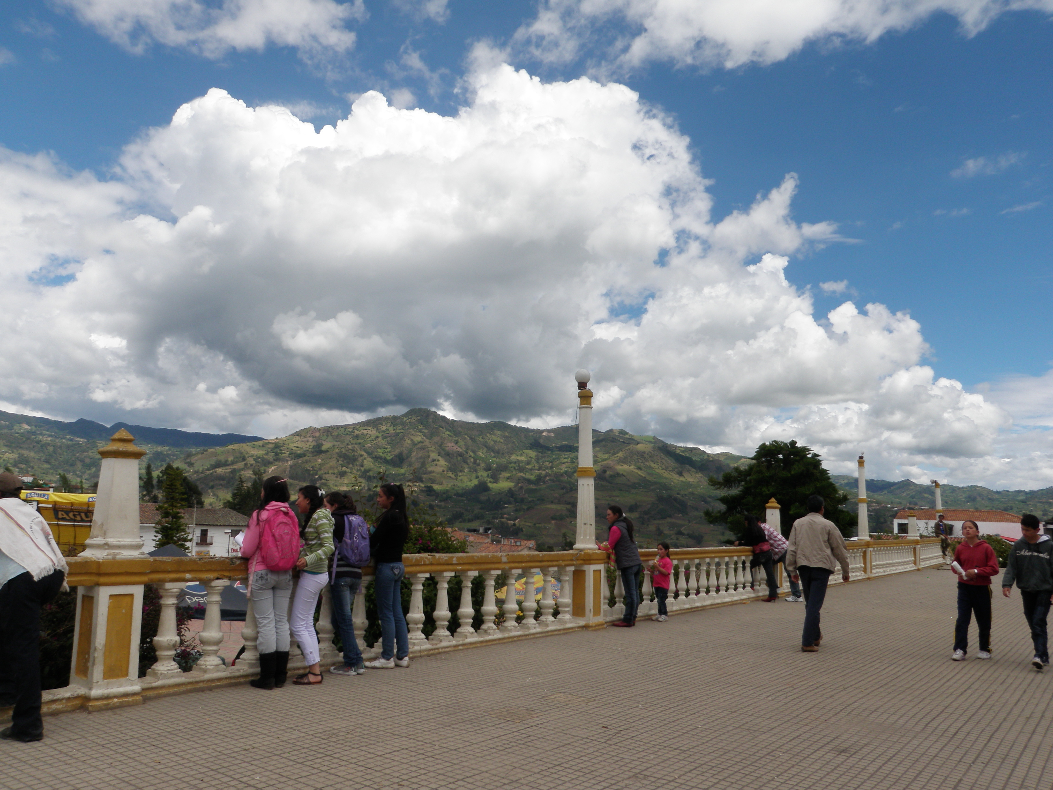 Sector Urbano del Municipio de Turmequé